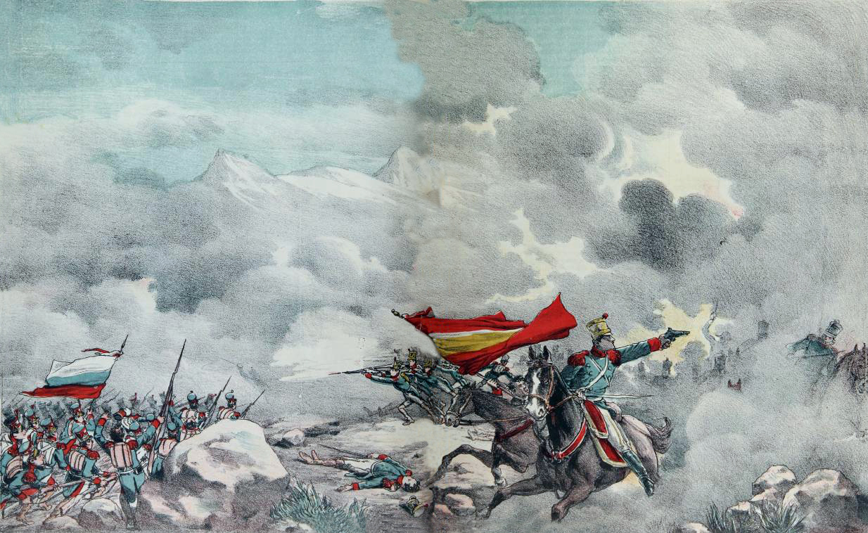 Batalla de Chacabuco (12 de febrero de 1817)